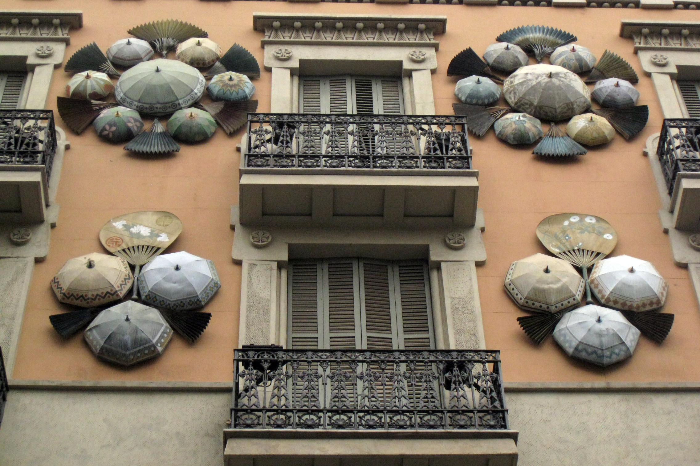 Casa Bruno Cuadros (Barcelona)